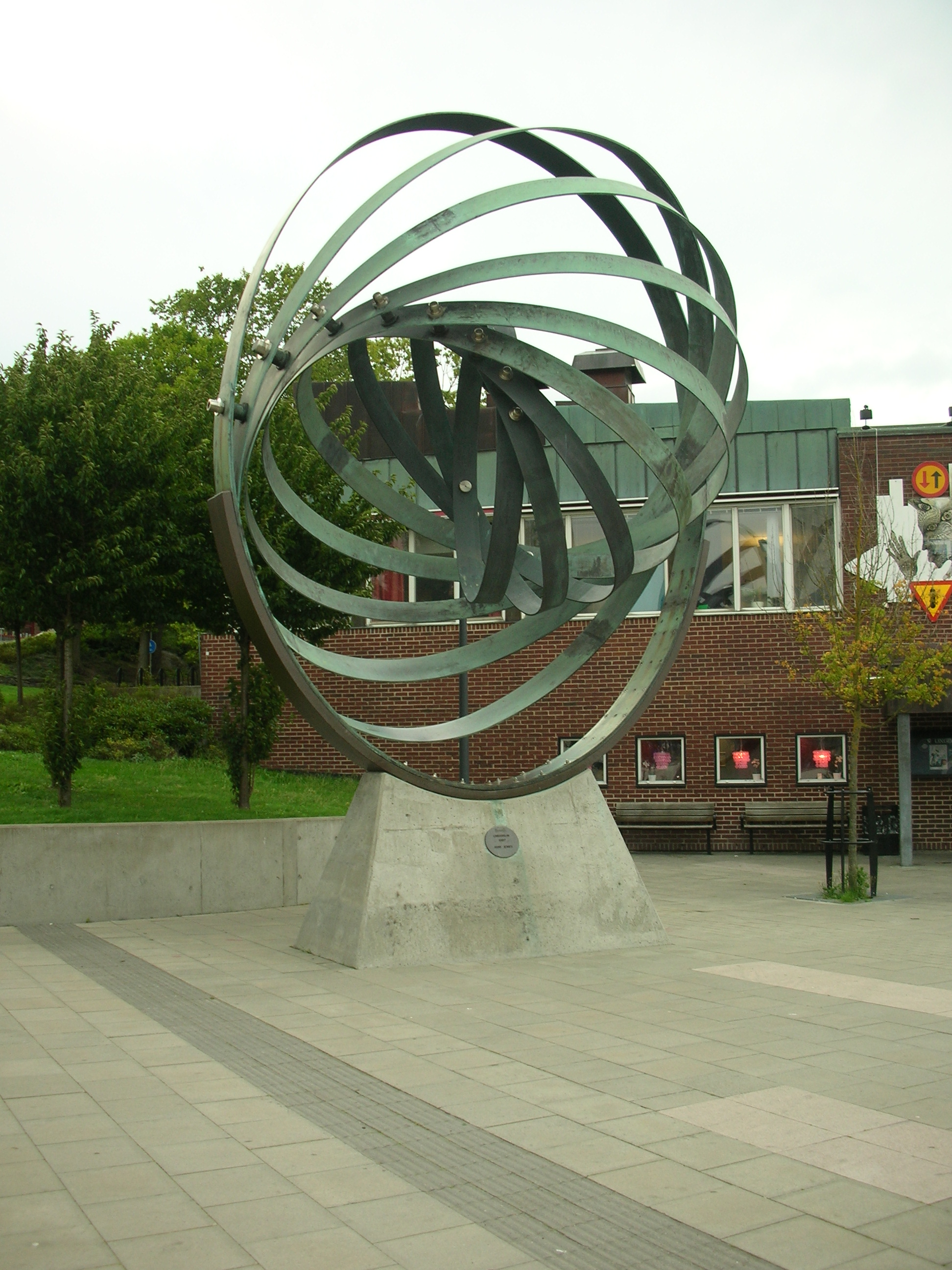 Arne Jones, 1967. Ställbart universum. Flyttad från sitt ursprungliga läge. Frölunda torg.